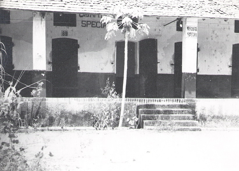 Ce photo est de mon pere décédé. Pas de copyright.